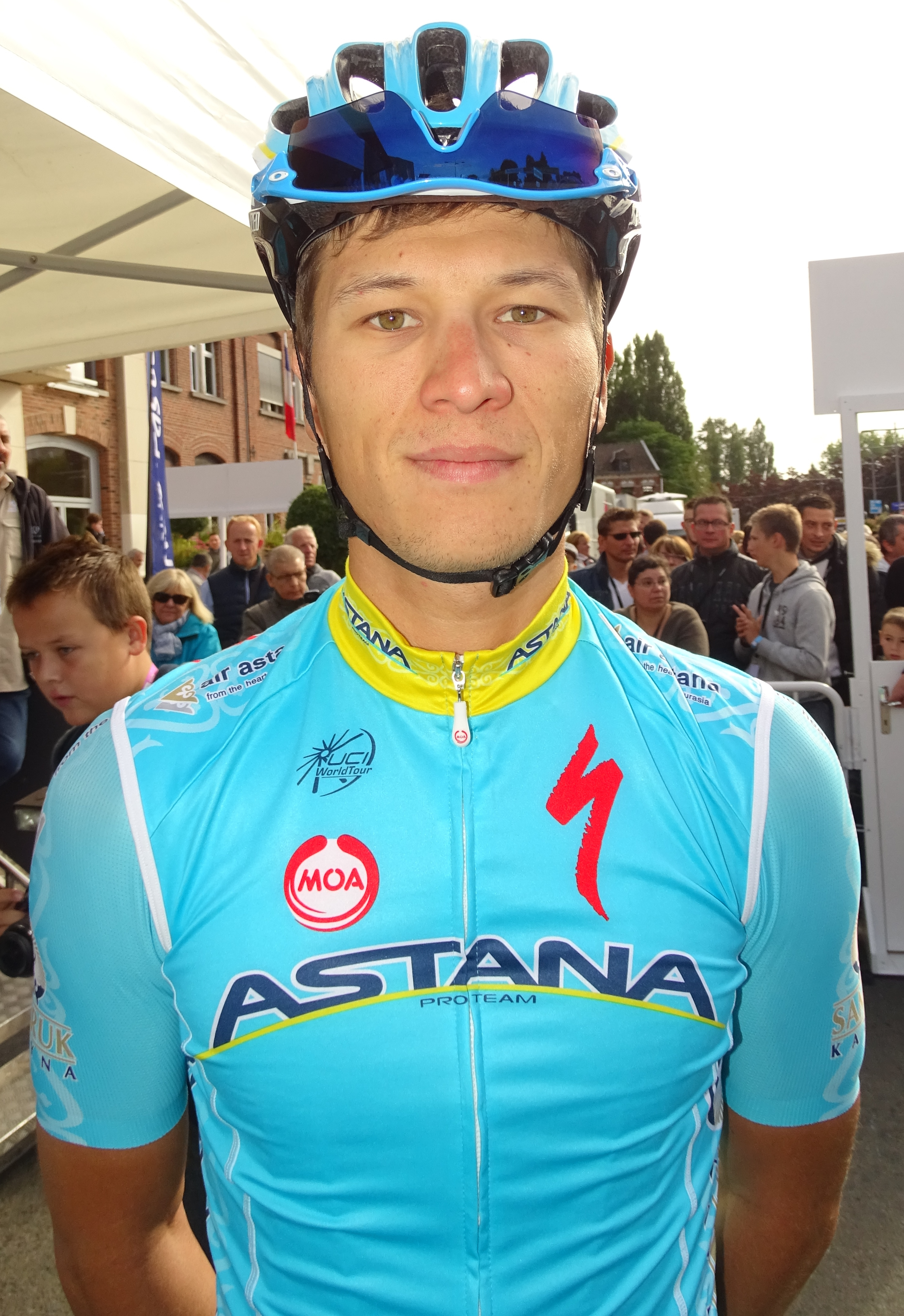 Reportage réalisé le dimanche 6 septembre à l'occasion du départ et de l'arrivée du Grand Prix de Fourmies 2015 à Fourmies, Nord-Pas-de-Calais, France.